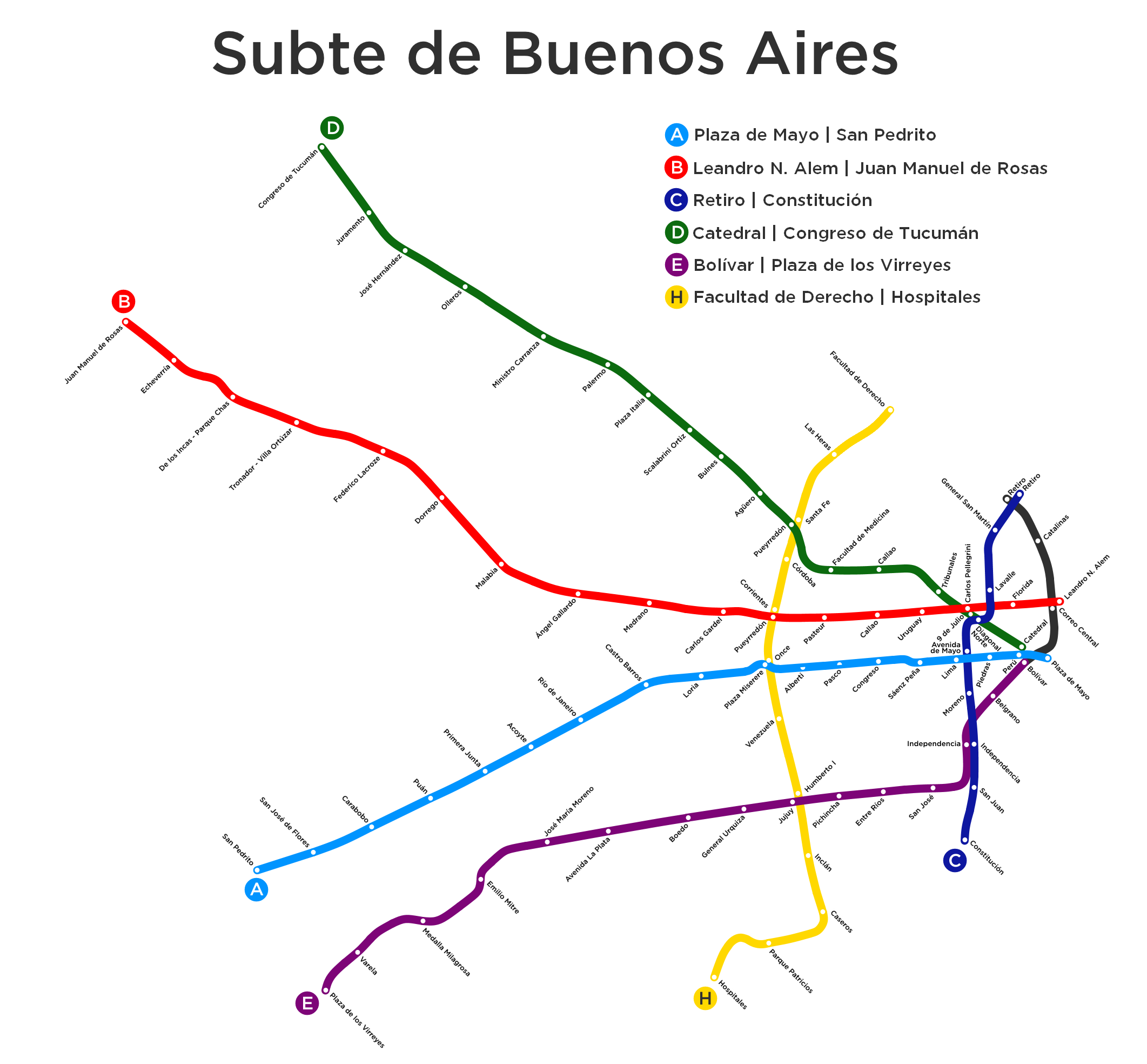 Situación de la red de subterráneos de Buenos Aires a junio de 2018. Los trazos en gris corresponden a extensiones en construcción (Bolívar a Retiro de la línea E).